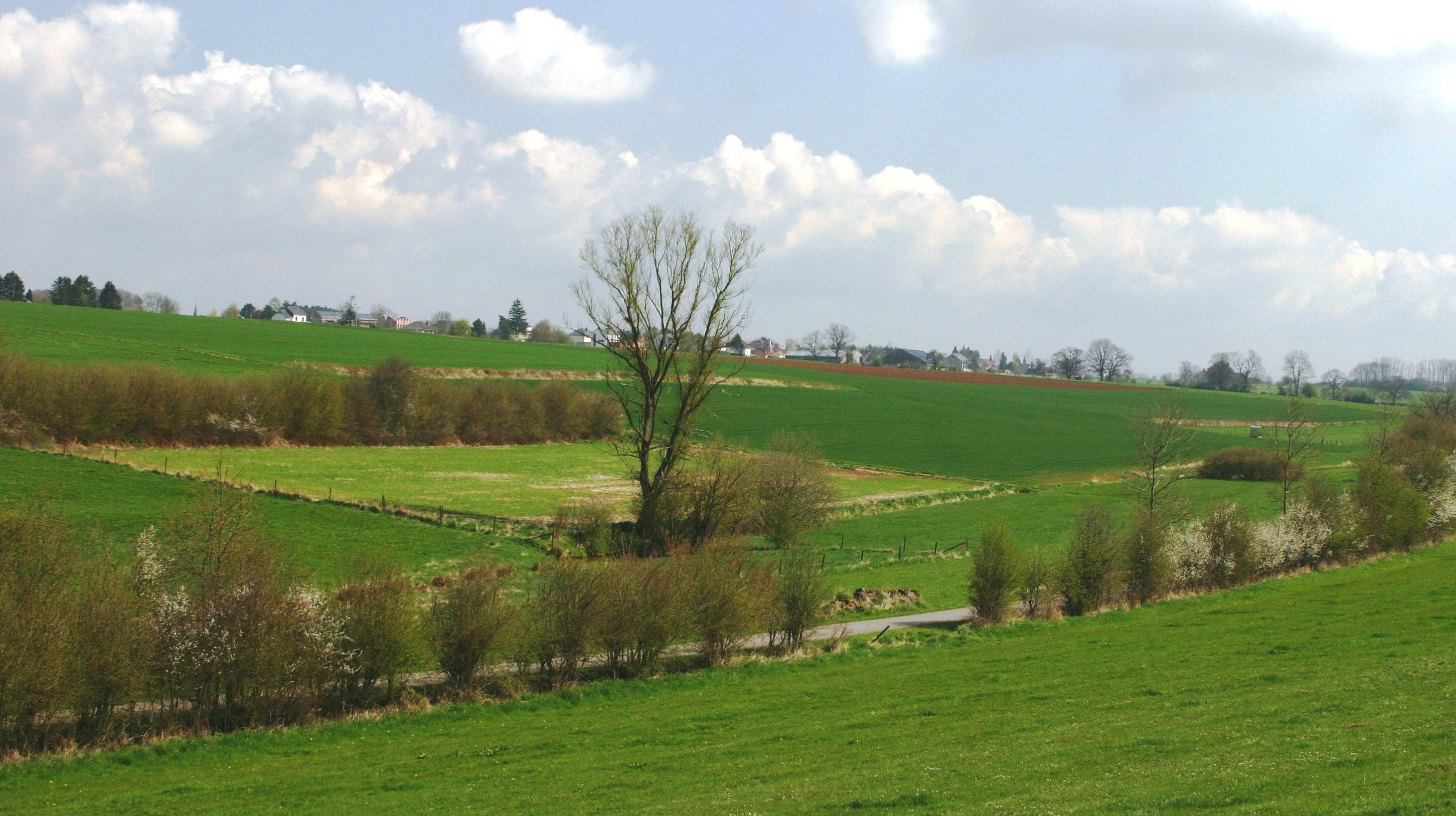 Dall vun der Millebaach am Ieweschte Laf. Vir am Bild laanscht d'Heck déi fréier Atertlinn.Millebaach Kenzeg + Millebaach Kenzeg